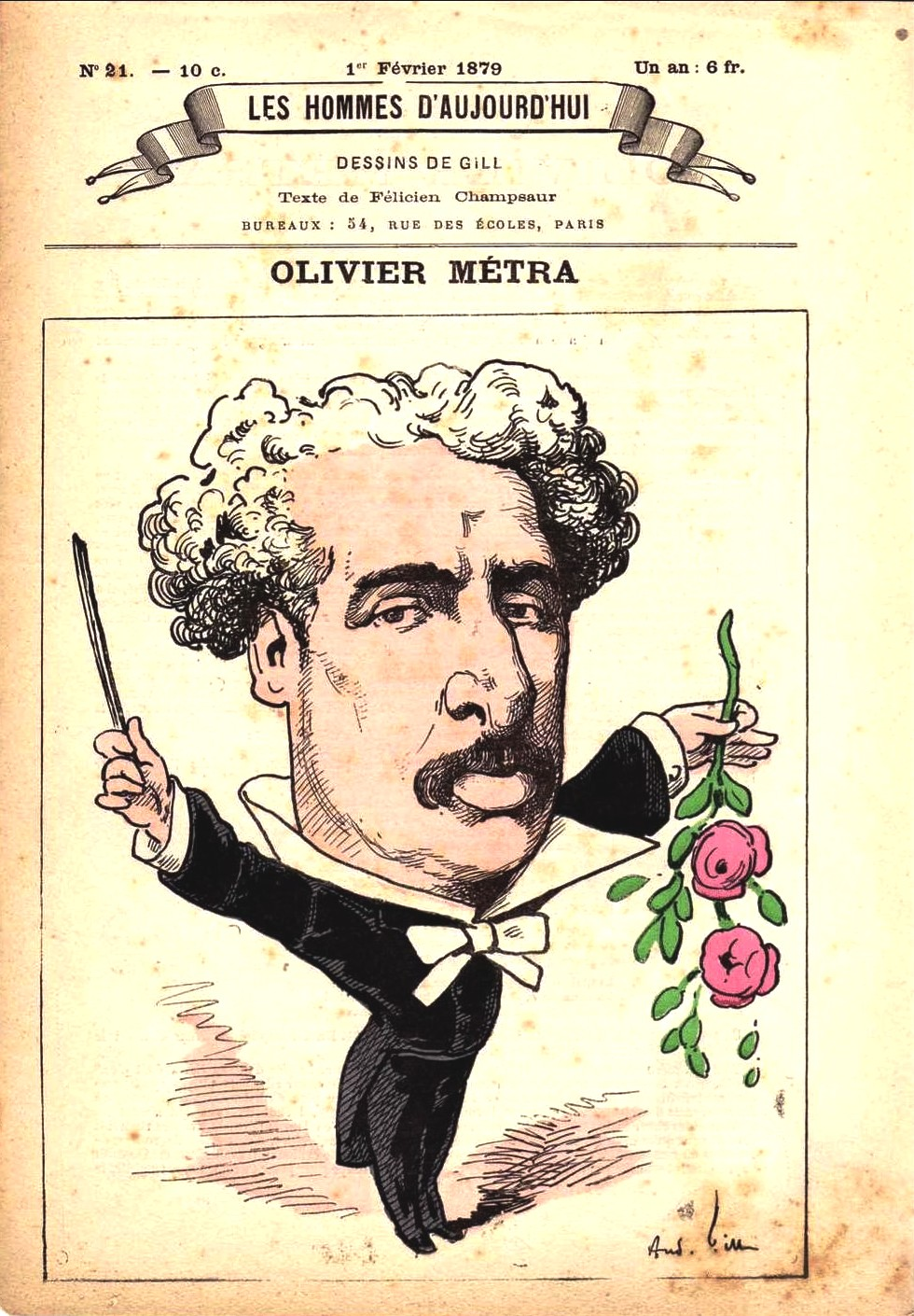 Olivier Métra par André Gill, Les Hommes d'aujourd'hui, n°21 - 1er février 1879